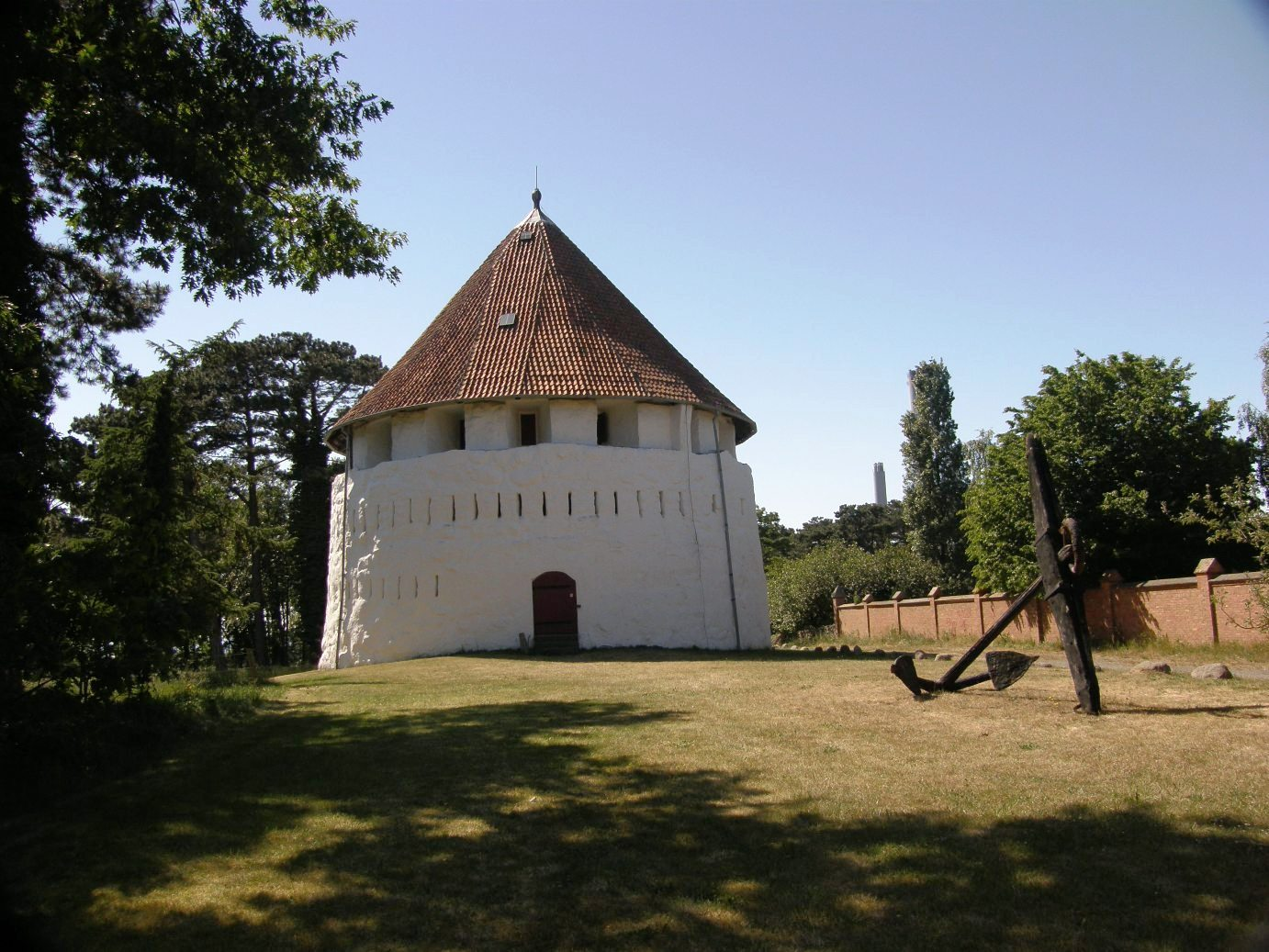 rotunda wojskowa